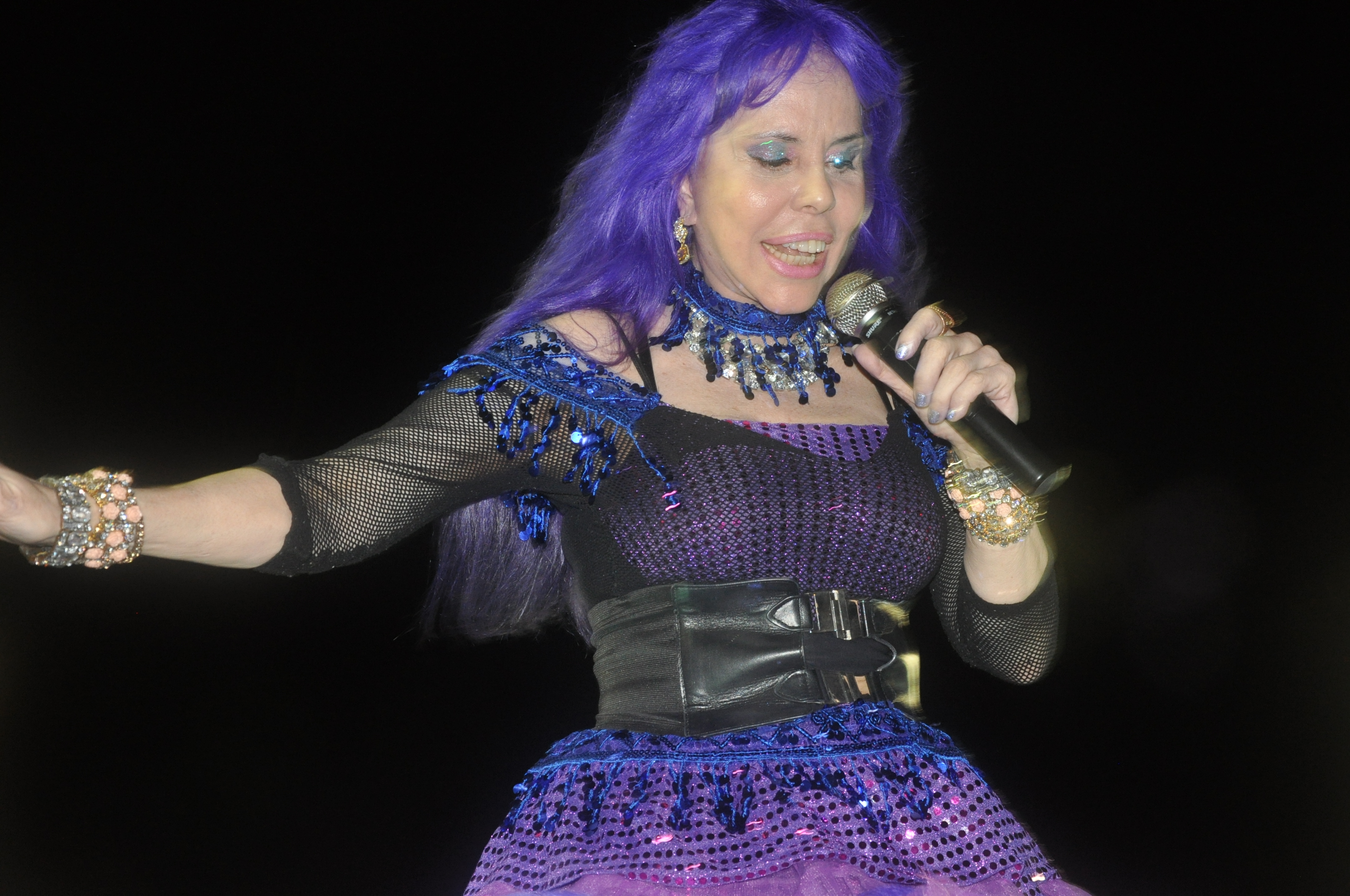 Carnaval 2914 - Baby do Brasil - Circuito Dodô - Barra. Foto: Rita Barreto - Bahiatursa